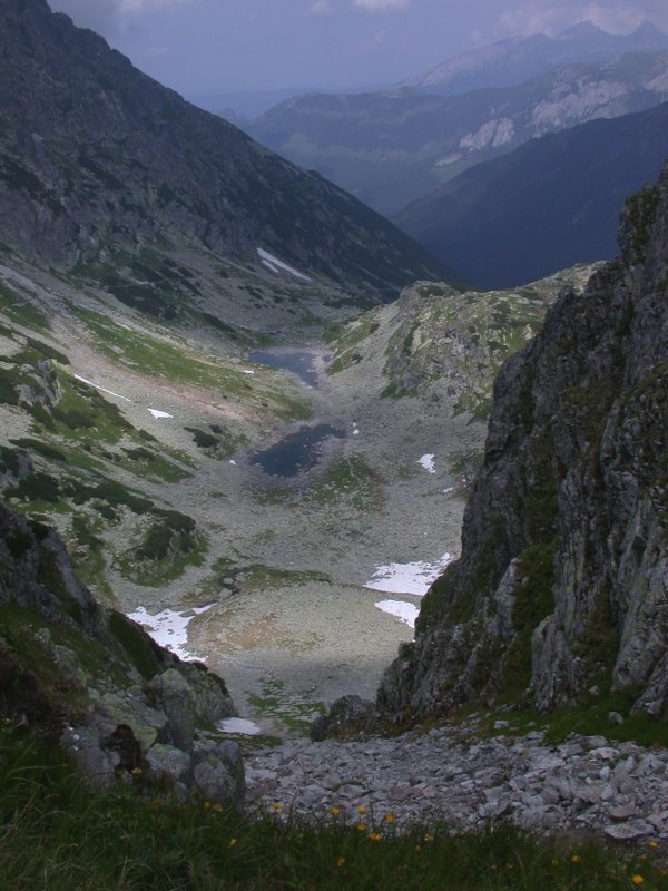 Dolinka za Mnichem - The view from Wrota Chałubińskiego (Chałubińskiego Gates) - Tatra Mountains.